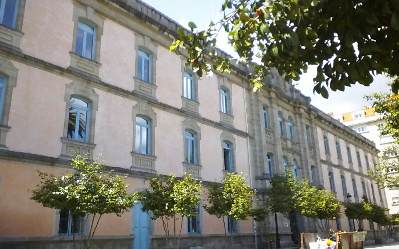 Facultad de Bellas Artes en Pontevedra capital